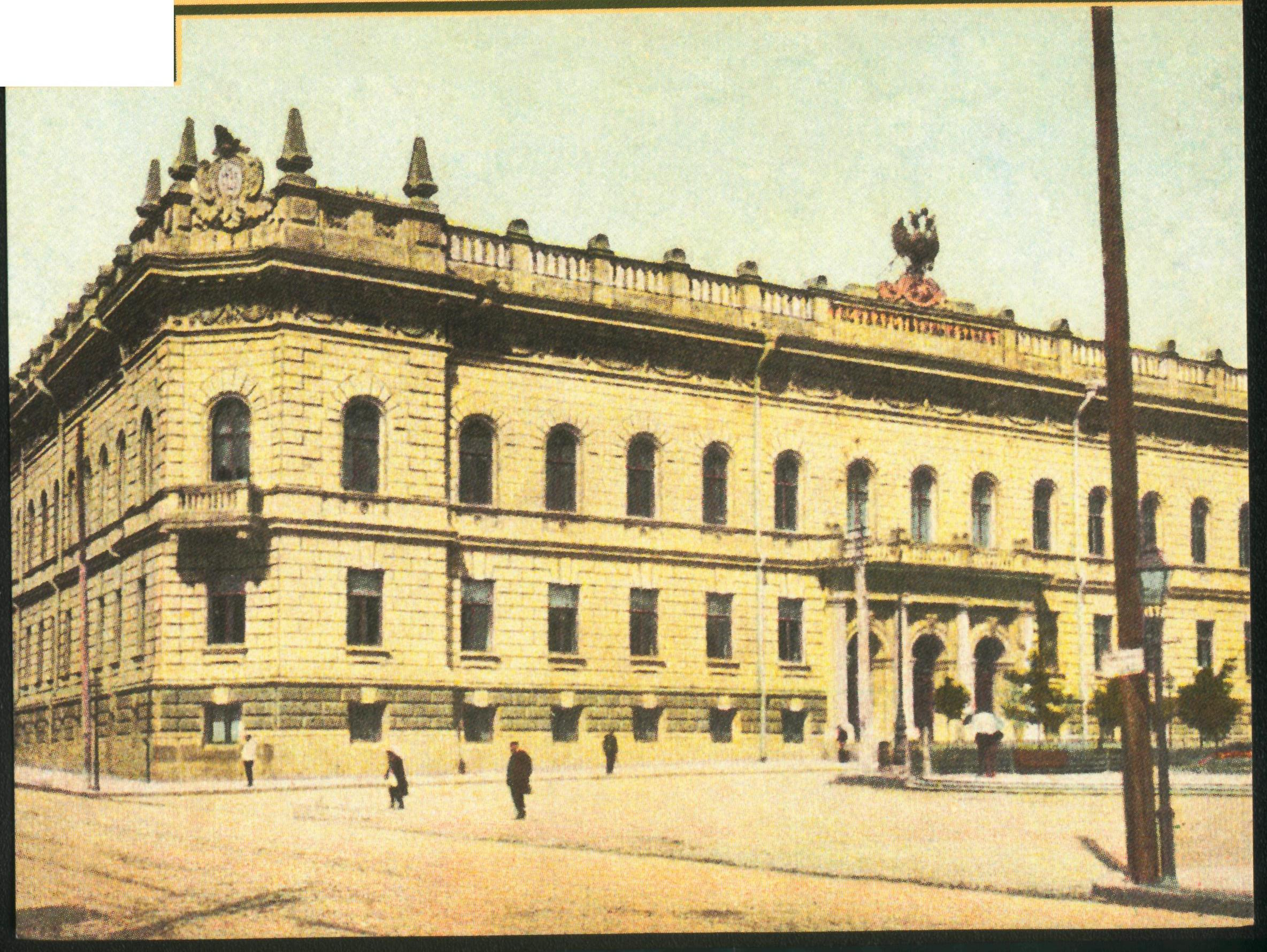 Открытое письмо. Государственный Банк Российской Империи (Госбанк СССР, с 1992 Нацбанк Украины), Харьков. Репринт. Вид от ул. Сумской на банк и Театральную площадь. Впоследствии, в 1930-х, надстроен А.Н. Бекетовым на два этажа.